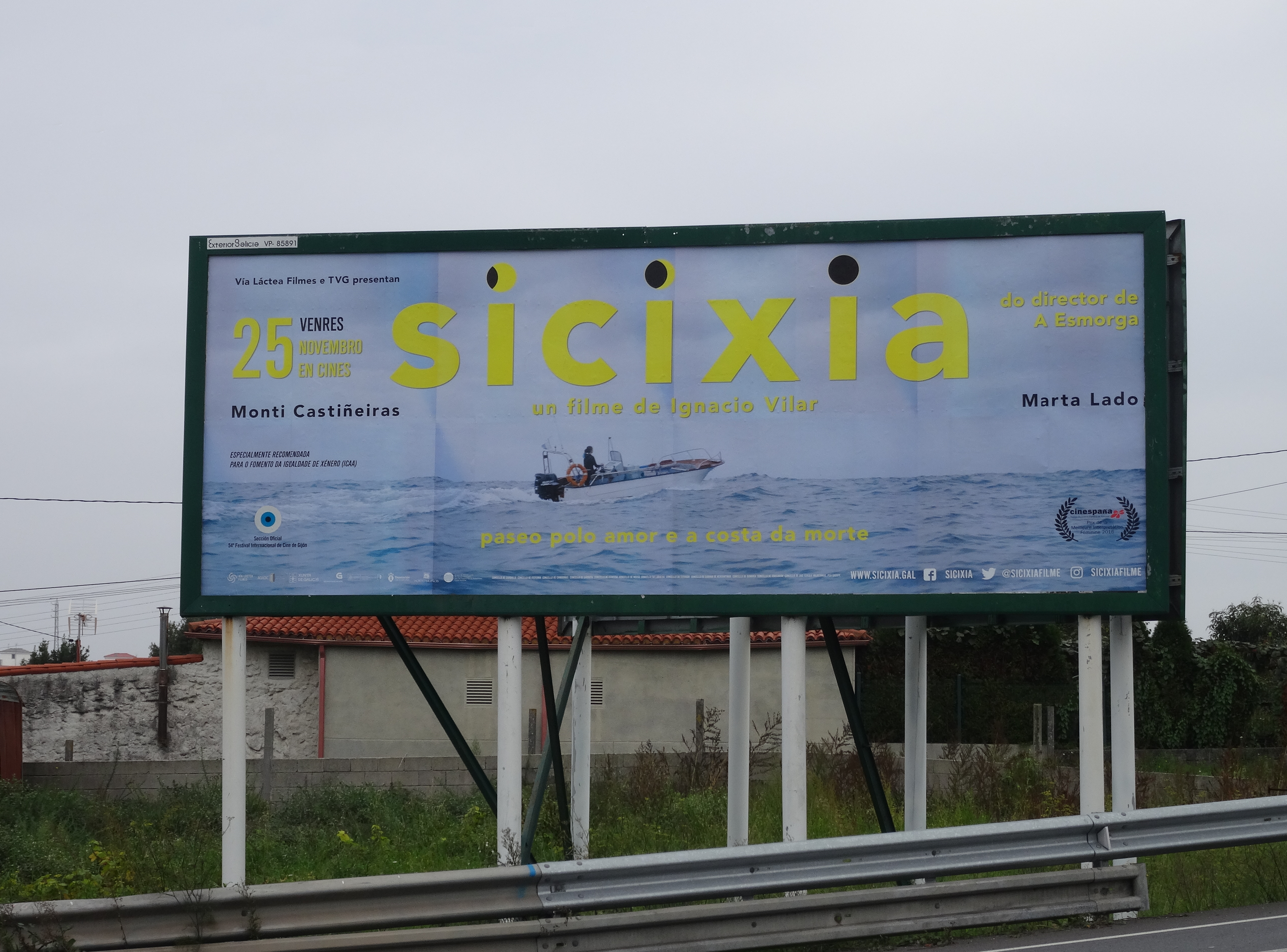 Ver título.